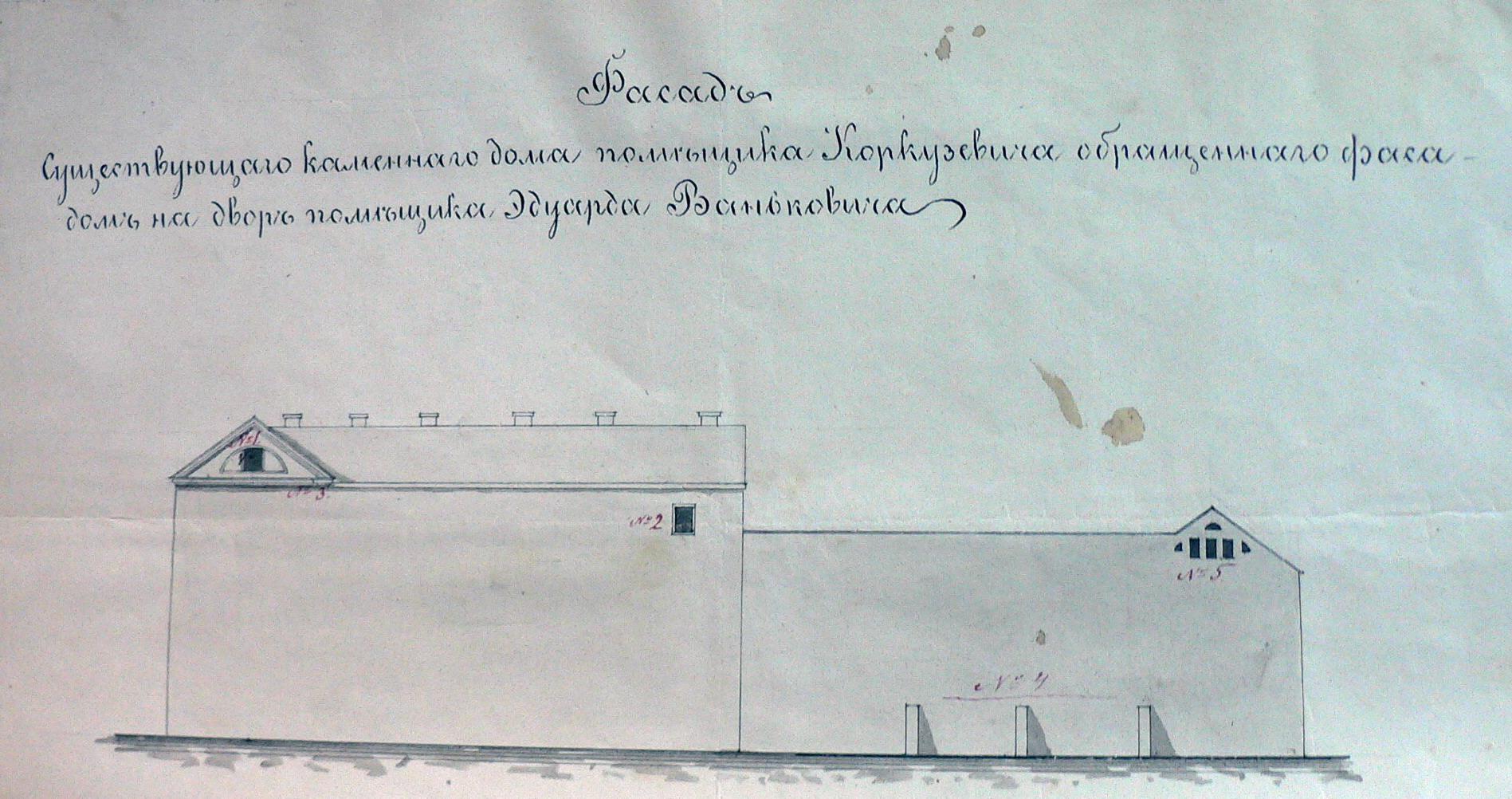 Беларуская (тарашкевіца): Менск (Miensk), вуліца Валоцкая (vulica Vałockaja). Камяніца Каркузевічаў (Karkuzievič)